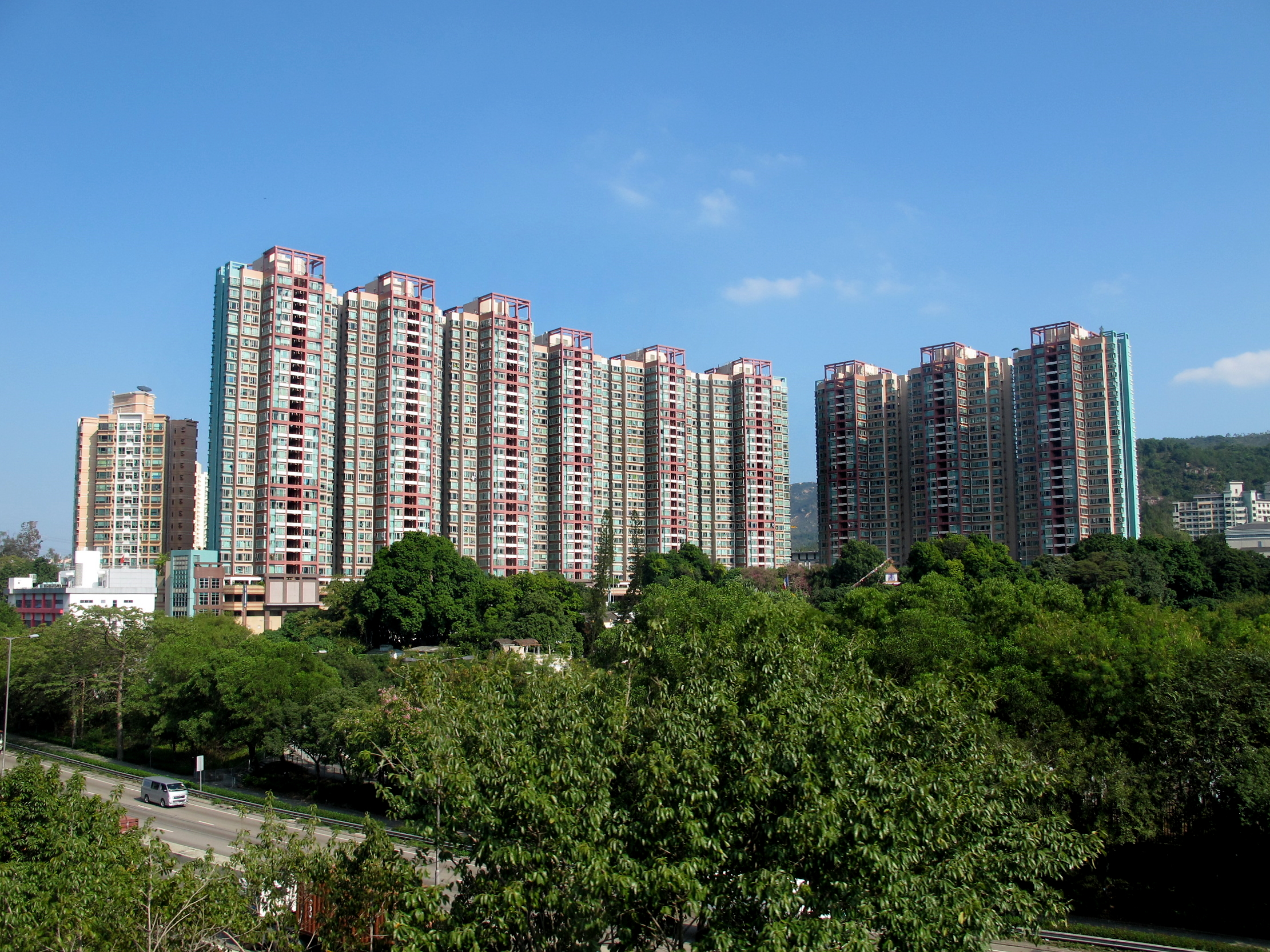 Parkland Villa 疊茵庭